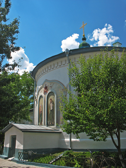 Покровський (теплий) храм Красногірського монастиря 1859 р.